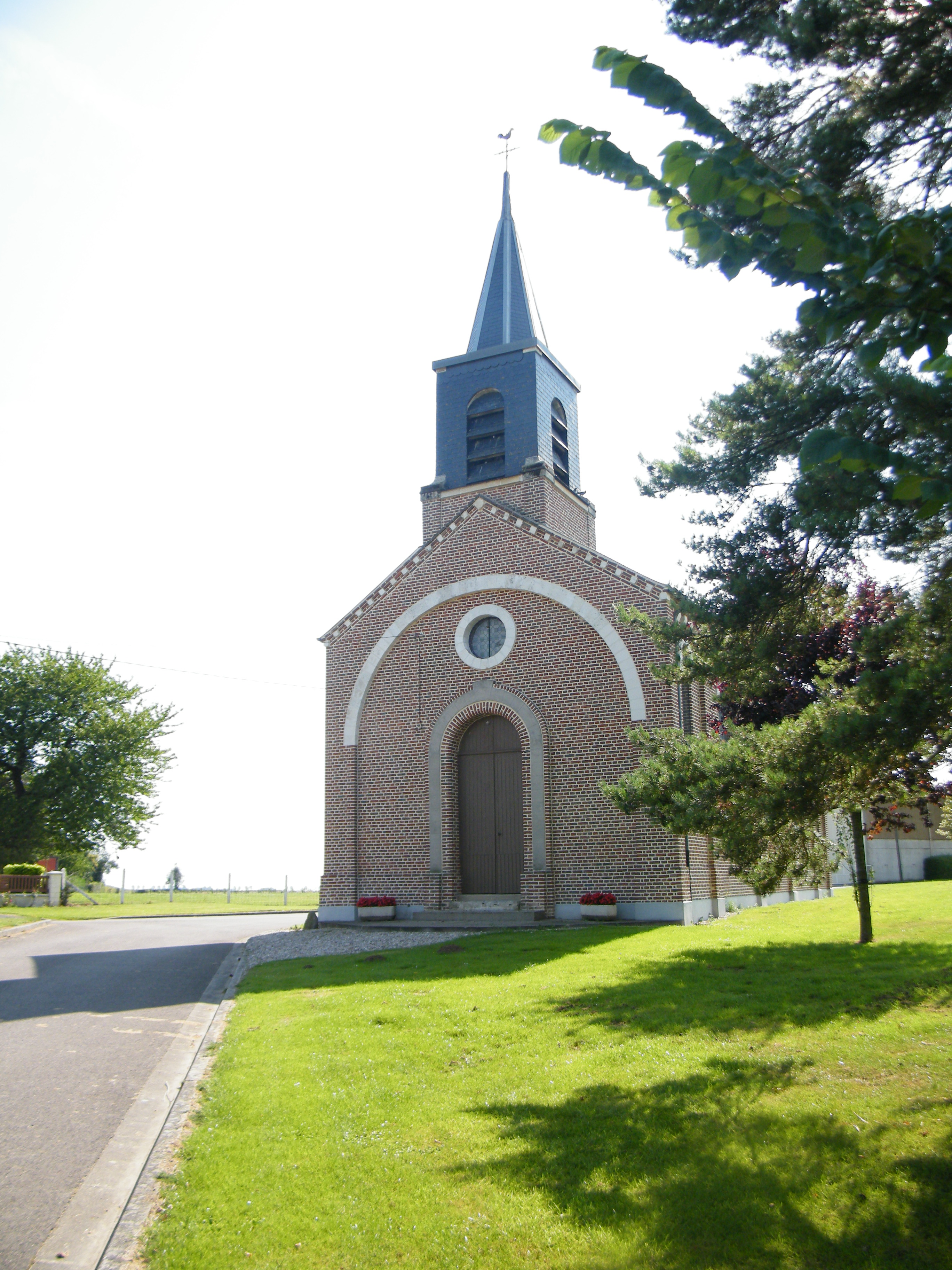 église.